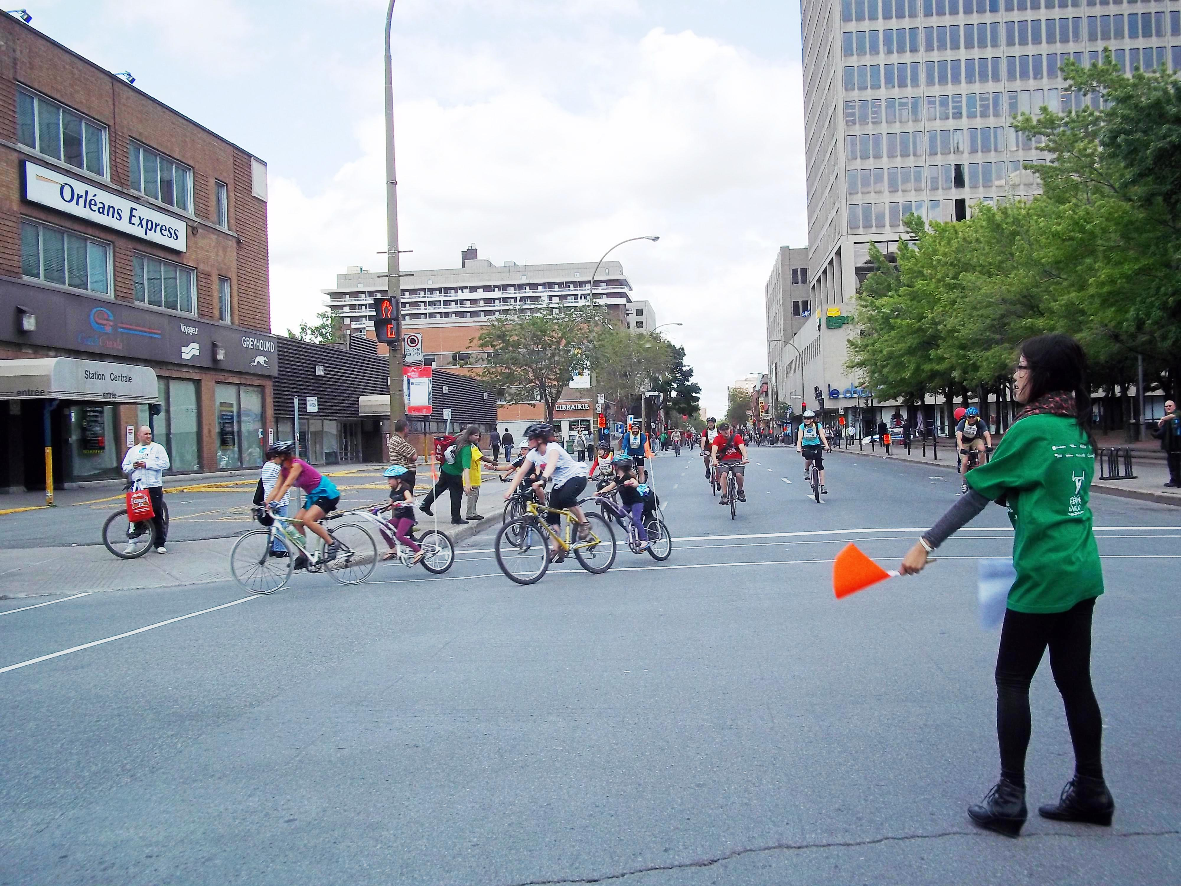 Tour de l'île de Montréal 2012, intersection rue Berri et boulevard De Maisonneuve